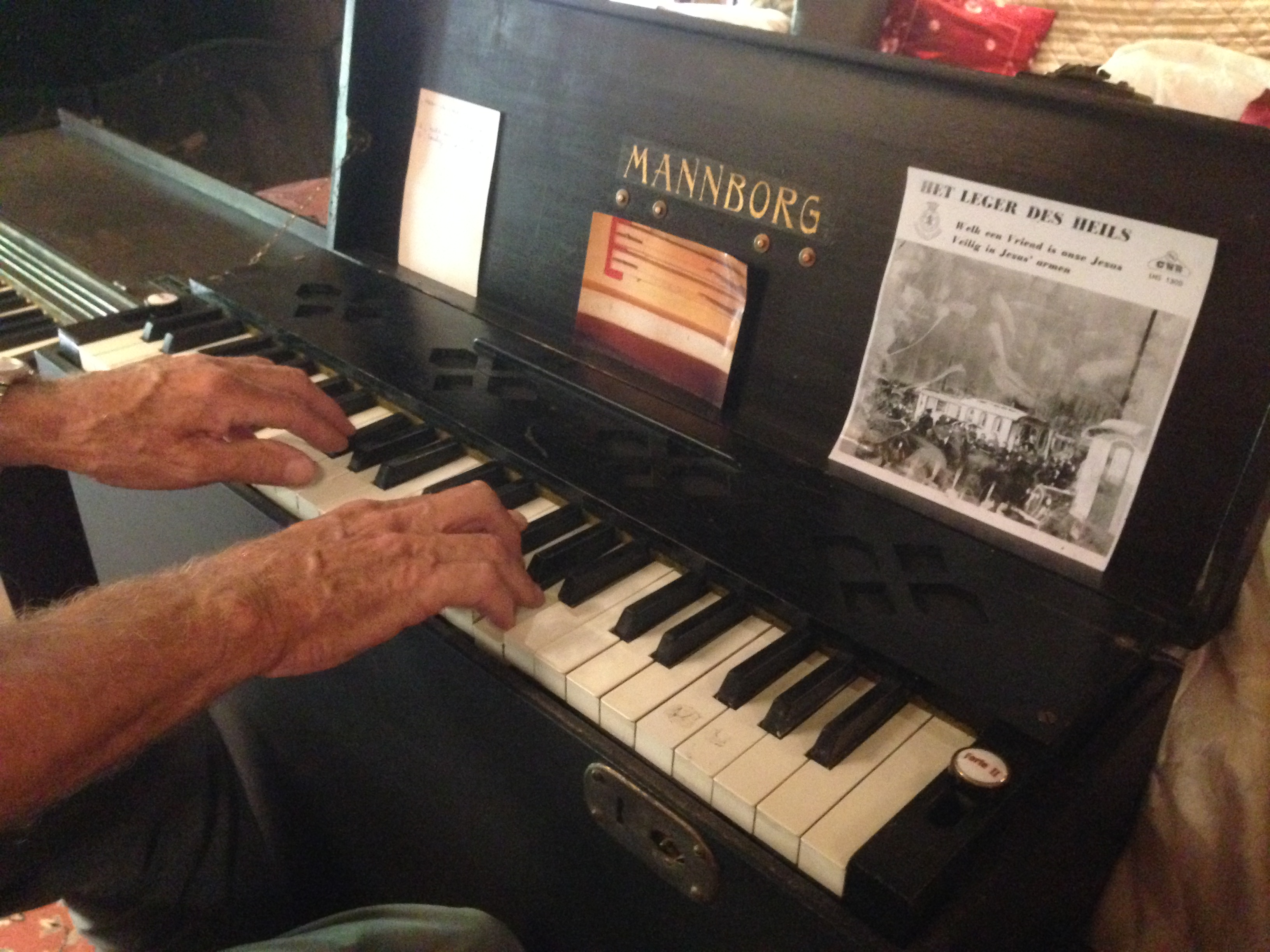 Harmonium Museum in Paasloo, Overijssel, Netherlands